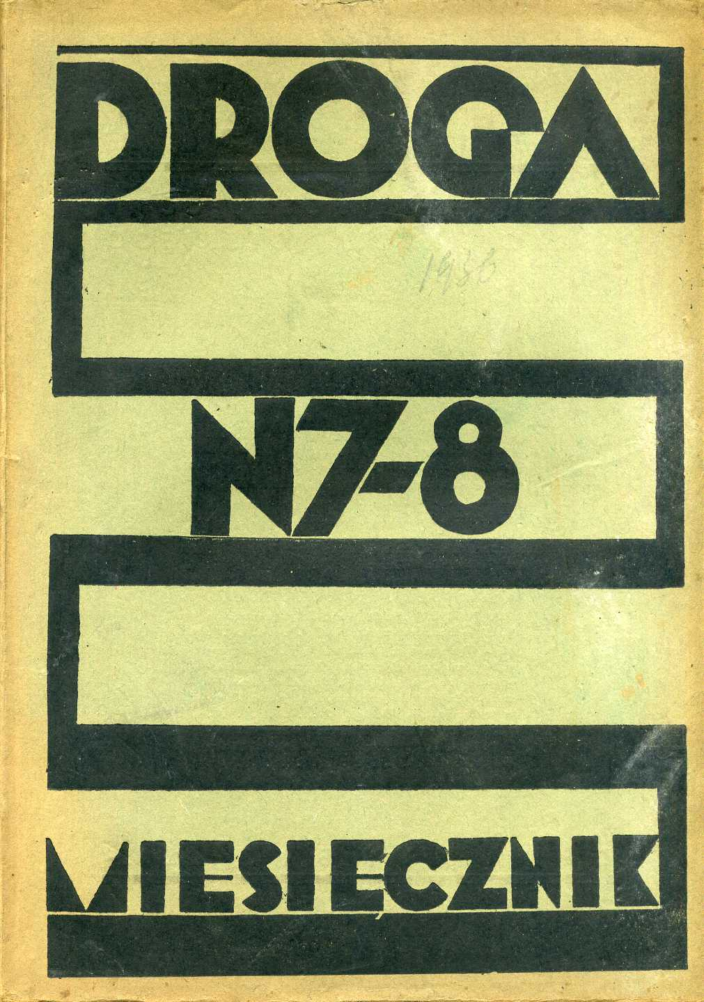 Okładka miesięcznika Droga z lipca 1936 roku, numer 7-8. Redaktor Wilam Horzyca. Redaktor odpowiedzialny Stanisław Podwysocki.